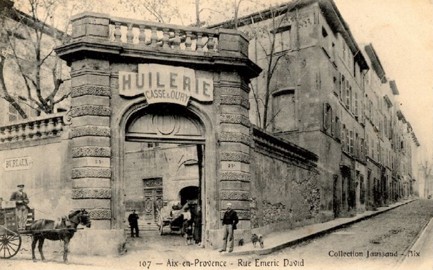 L'hôtel de Maliverny transformé en huilerie au début du XXe siècle, sous la direction de Mr Casse.